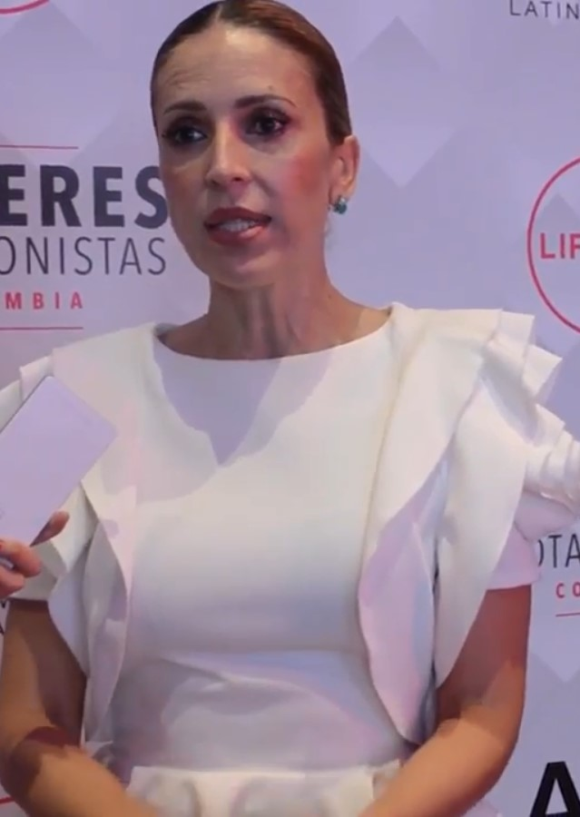 "Mujeres Protagonistas Colombia" un panel realizado por el Canal Life Time, un espacio de reflexión, intercambio de ideas y aprendizaje basado en las historias de vida de cinco mujeres empoderadas y exitosas en distintos ámbitos de la vida nacional, Kristina Lilley, María Carolina Hoyos, Alejandra Azcarate, Leonor Espinosa y Angélica Balanta. Las mujeres también tienen estilo de vida, hay que entender cuales son sus hábitos, deseos. Eso es lo que promueve la nueva franja del Canal Lifetime, empoderar a la mujer con ideas creativas e historias de carne y hueso que pasan a nuestro alrededor. Las mujeres famosas en Colombia también hacen parte de los movimientos femeninos. El empoderamiento de la mujer es un tema del que me encanta hablar y hoy en día en nuestro país es cada vez más fuerte.